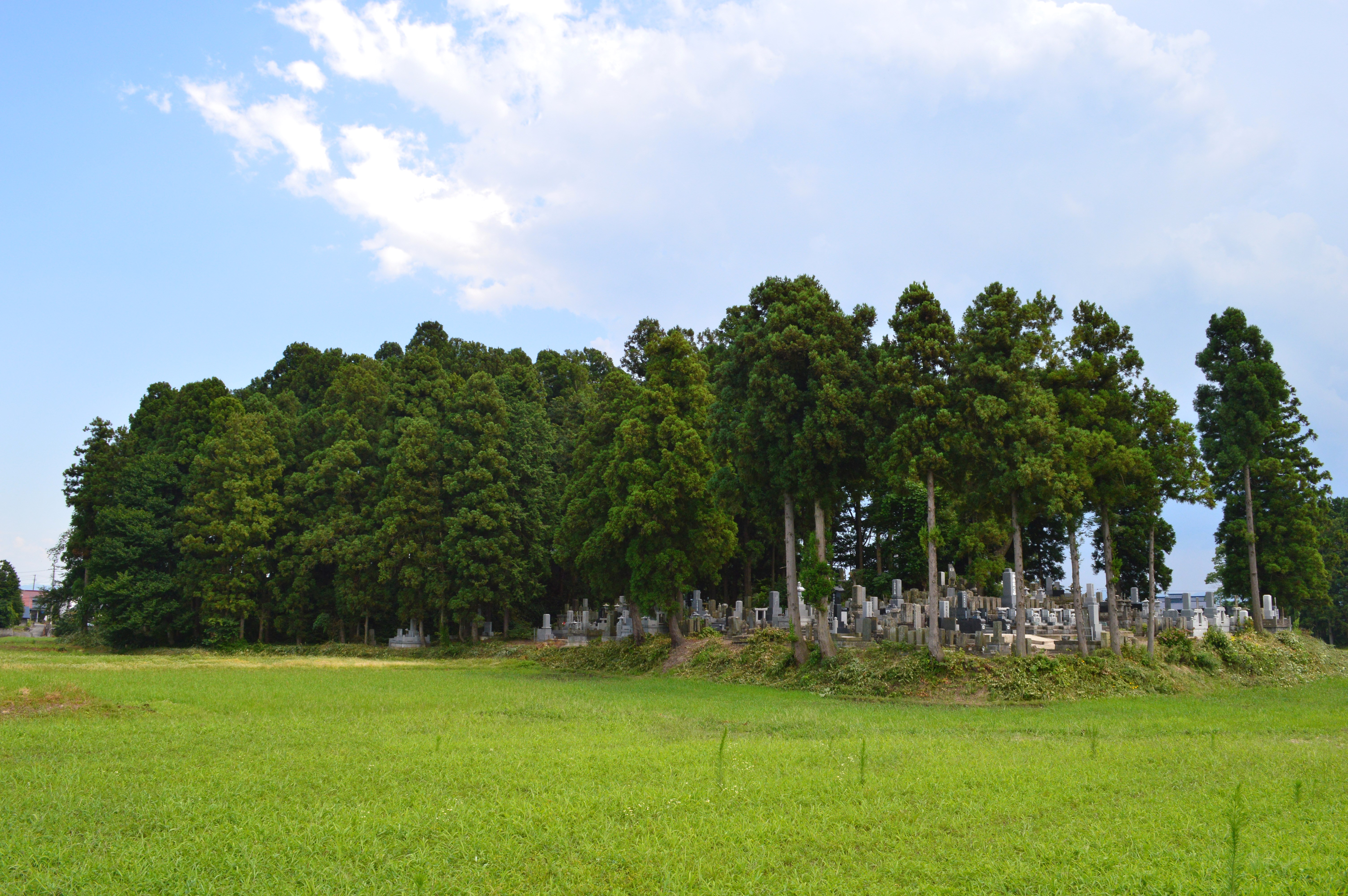 亀ヶ森古墳 全景